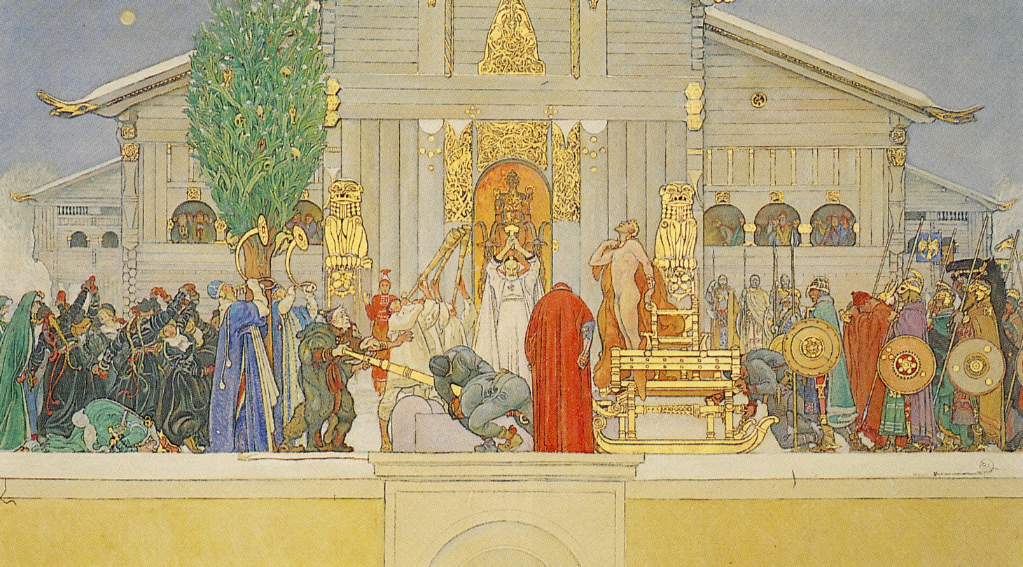 Carl Larsson, Midvinterblot, skiss 4, 1915. Olja på duk, 123 x 199 cm.